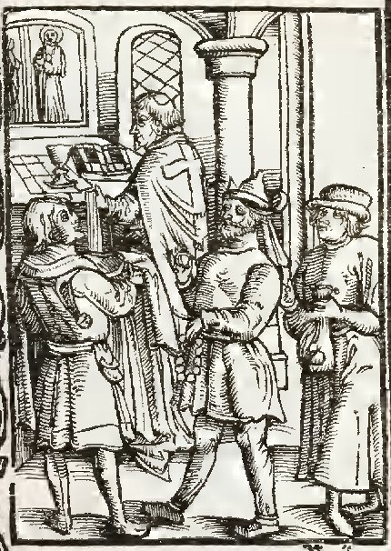 Die Mülle von Schwyndelszheym